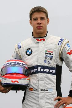 Retrato promocional del piloto Facu Regalía